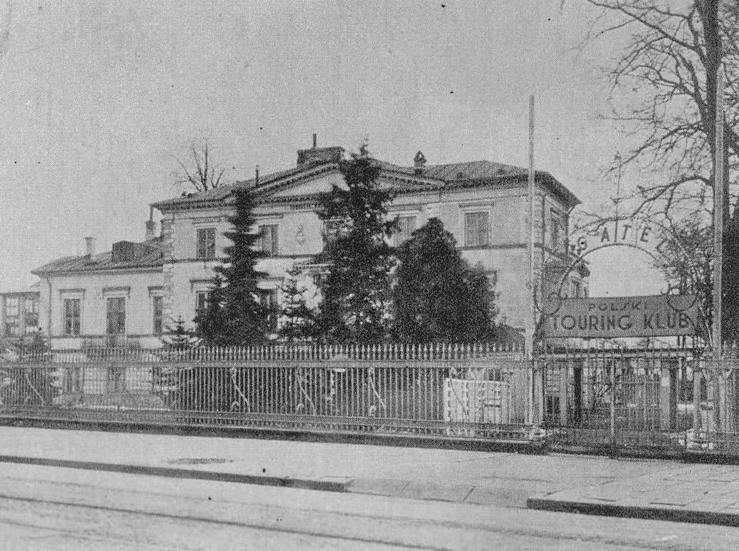 Pałacyk Bacciarellego, siedziba Towarzystwa Ogrodniczego Warszawskiego, ul. Bagatela 5